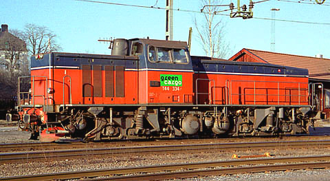 Diesellok typ T44. Denna typ av diesellok finns i Sverige och i Israel.